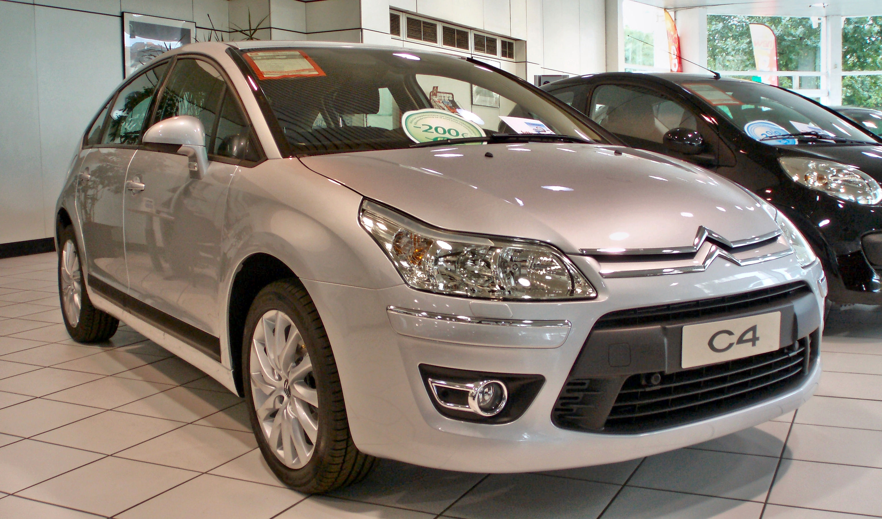 Nouvelle CITROEN C4 (2008)